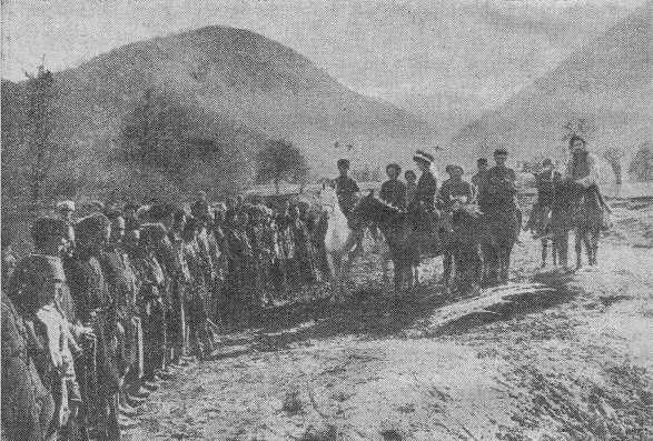 Узун-Хаджи и Дышнинский принимают парад войск Эмирства